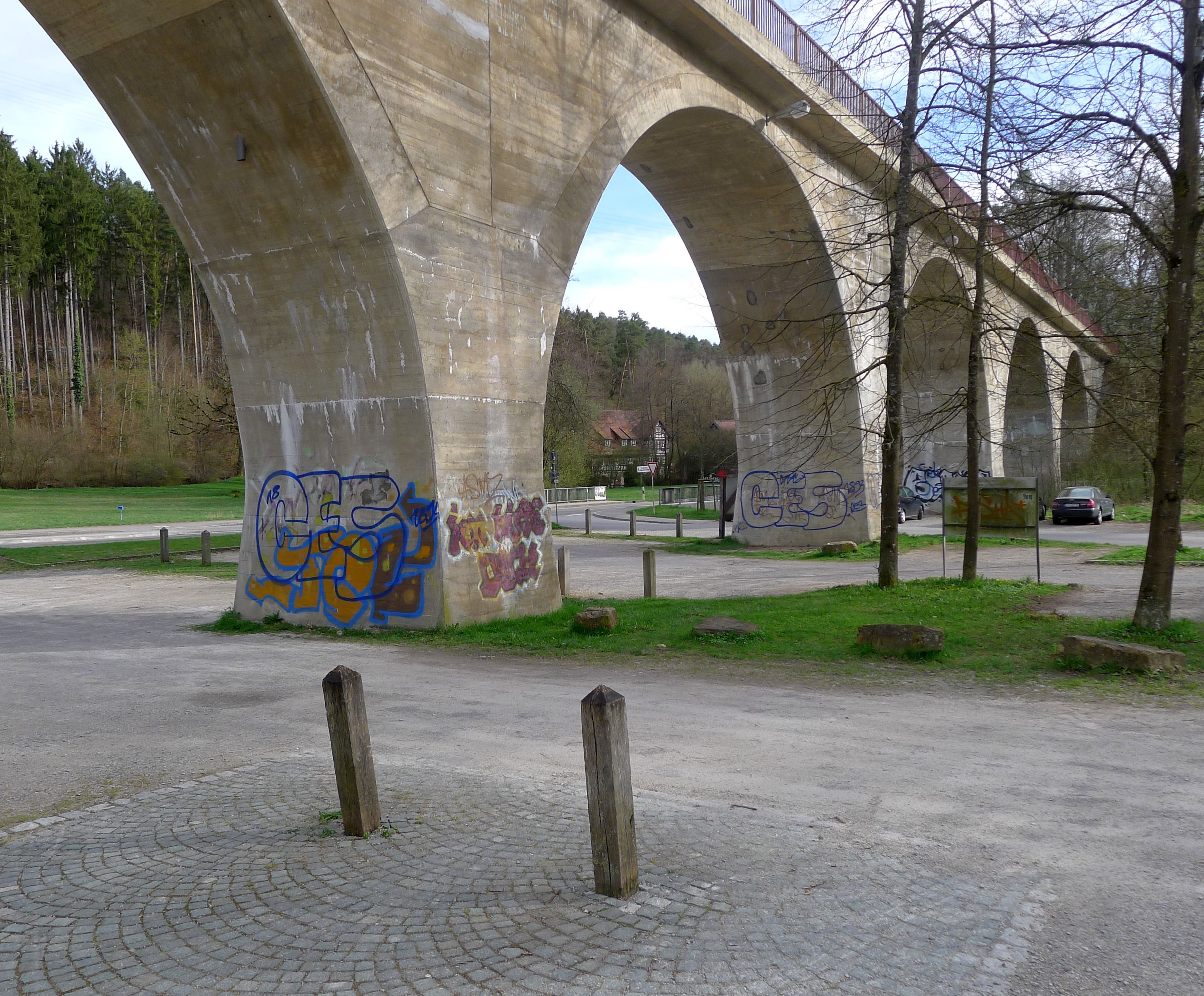 De brug van de voormalige Siebenmühlentalbahn, nu Bundeswanderweg, bij de Mäulesmühle (zichtbaar) in het Siebenmühlental (Stuttgart)